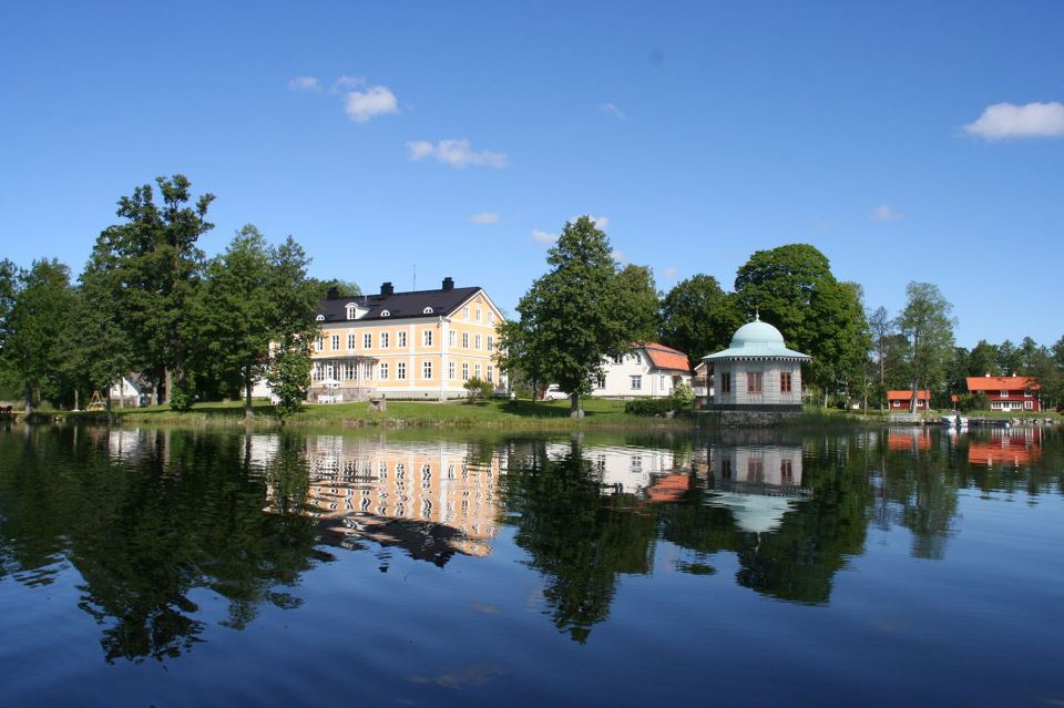 Vy från sjön Tislången